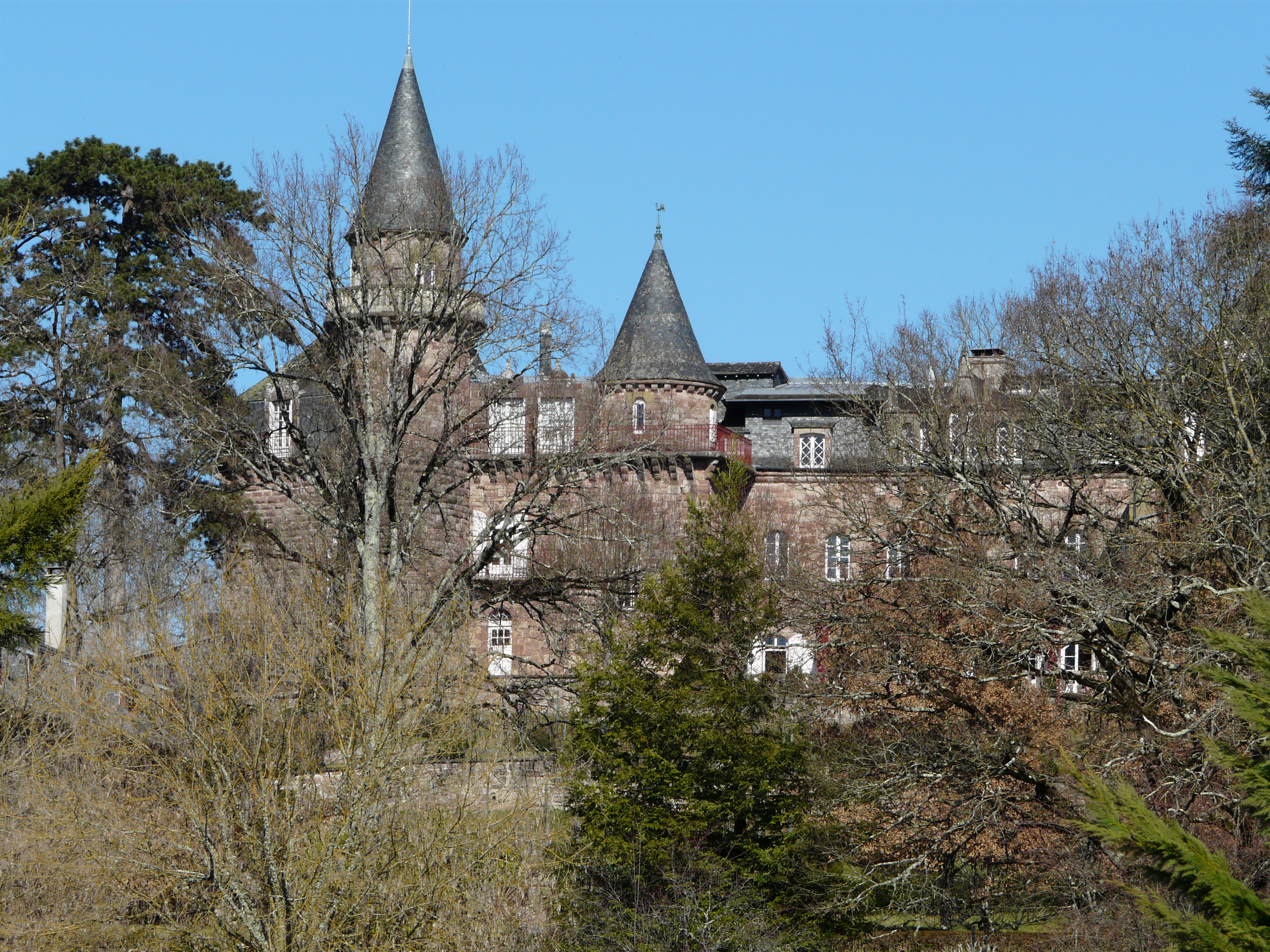 Castel Novel, Varetz, Corrèze, France.